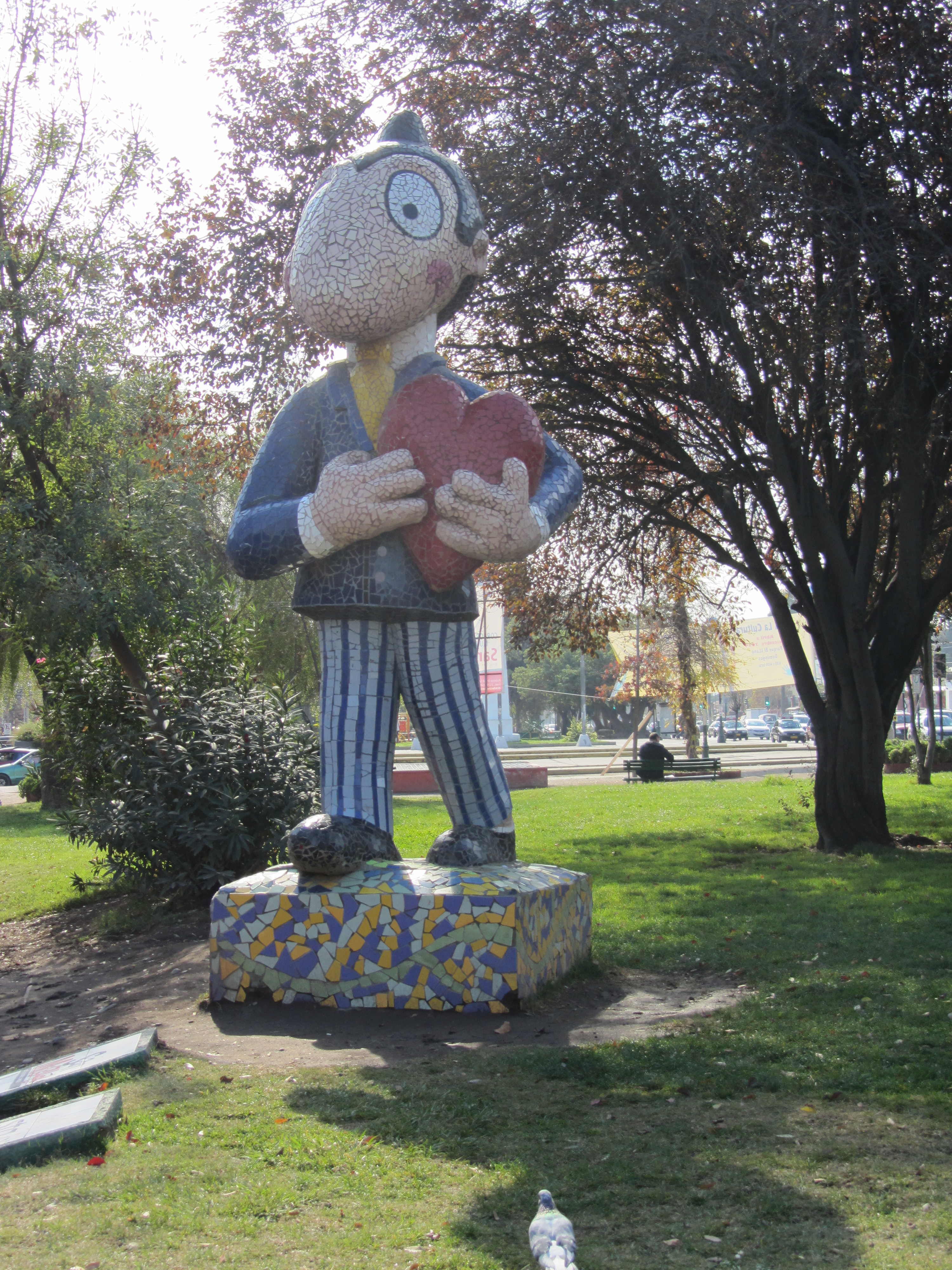 Parque del Cómic